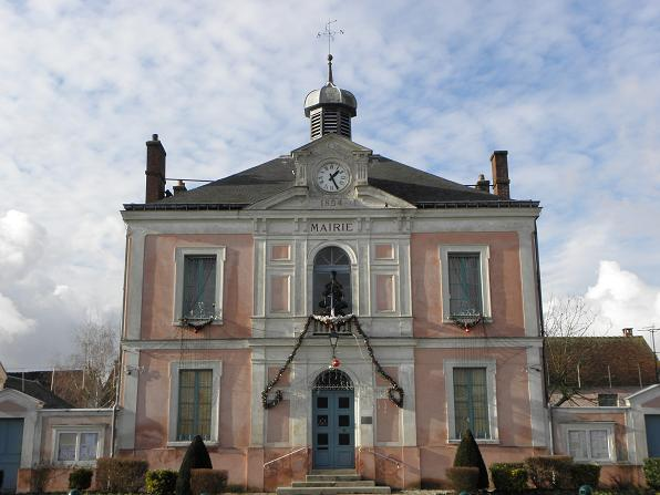 Mairie de Villeneuve-le-Comte (95).